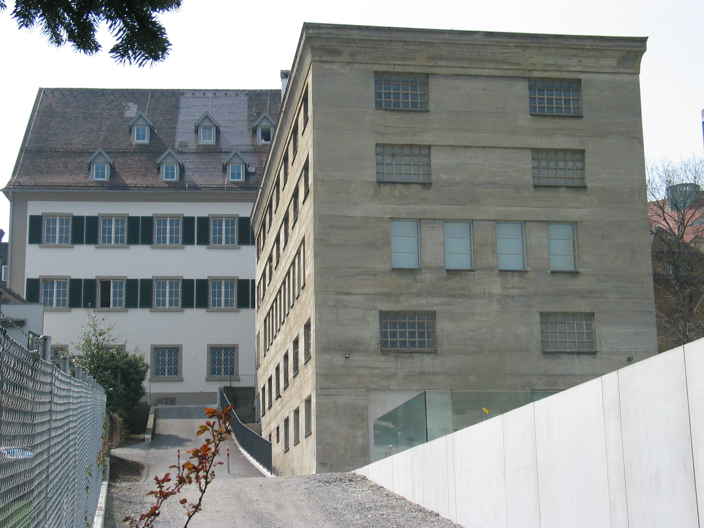 Blick von Norden aus auf das Gebäudeensemble des Vorarlberger Landesarchivs. Im Vordergrund der Betonbau des 2003 fertiggestellten Tiefspeichers, dahinter der Schüttbetonbau des Archivanbaus nach Plänen von Willibald Braun aus dem Jahr 1933 und im Hintergrund das Palais Waldburg-Wolfegg als Hauptgebäude des Landesarchivs.